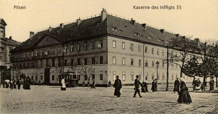 Kaserne des k.u.k. Infanterieregiments Nr. 35